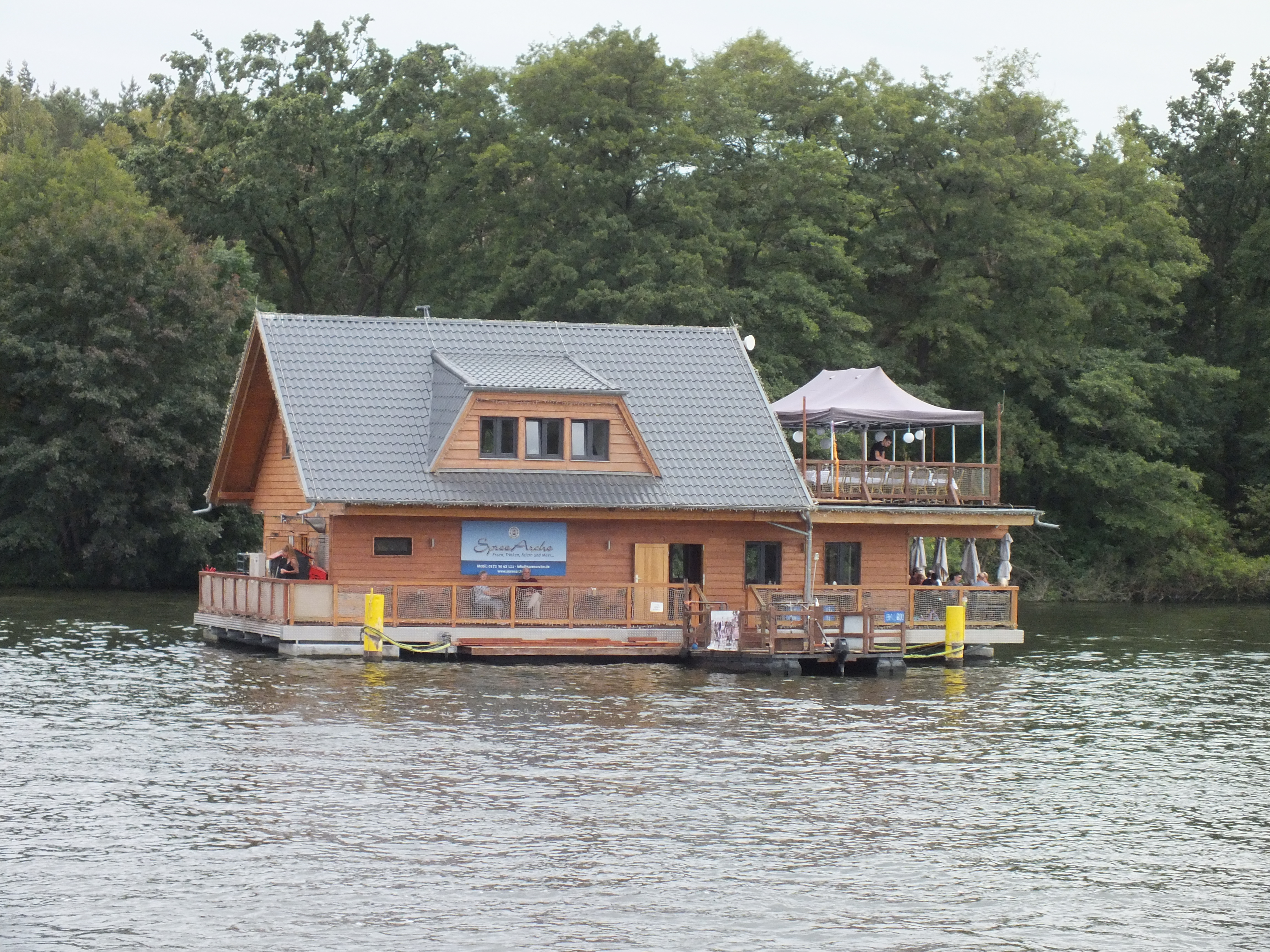 Fahrgastschiffe in Berlin: Restaurant-Floß SpreeArche